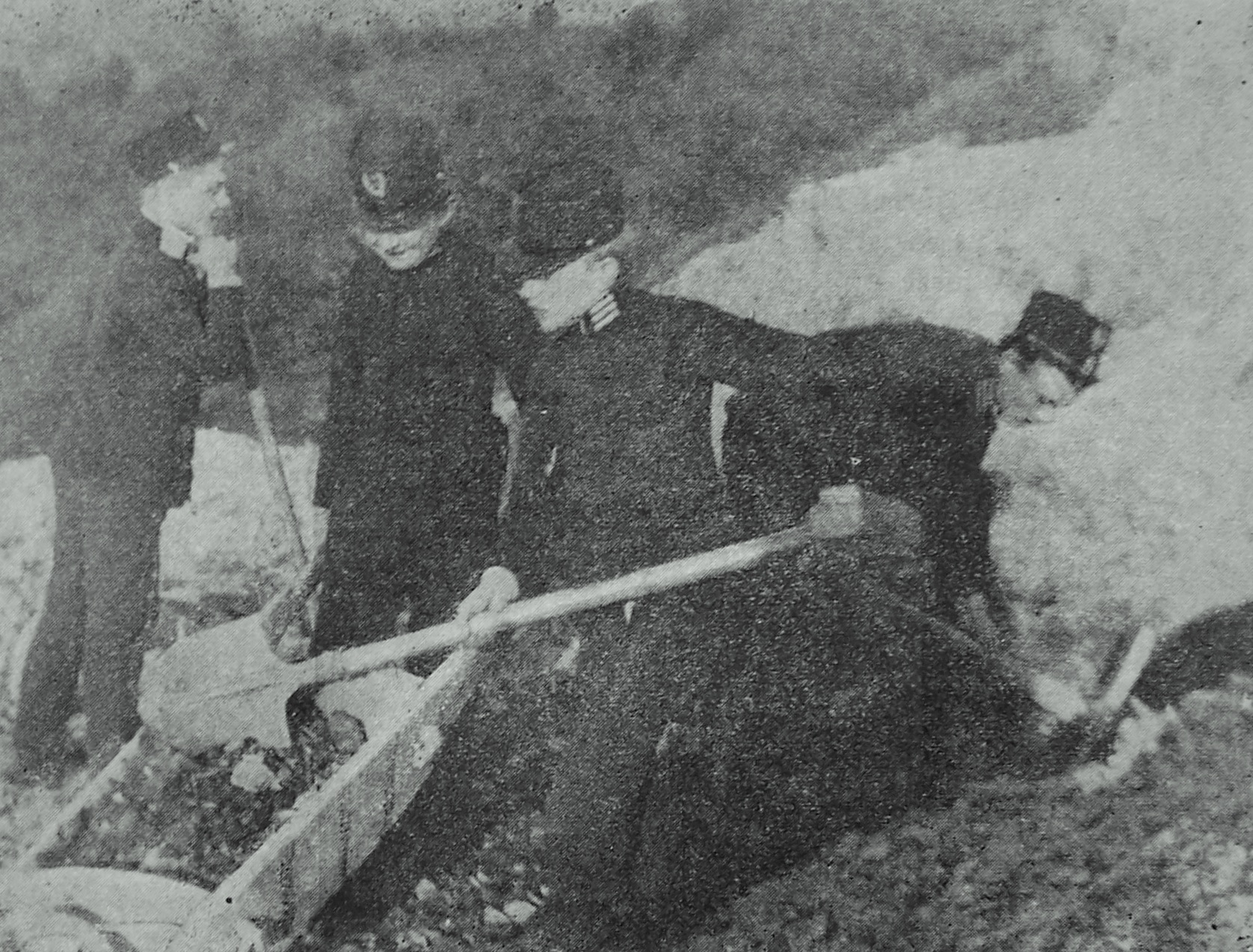 Sanoccy gimnazjaliści sypiący Kopiec Adama Mickiewicza w Sanoku